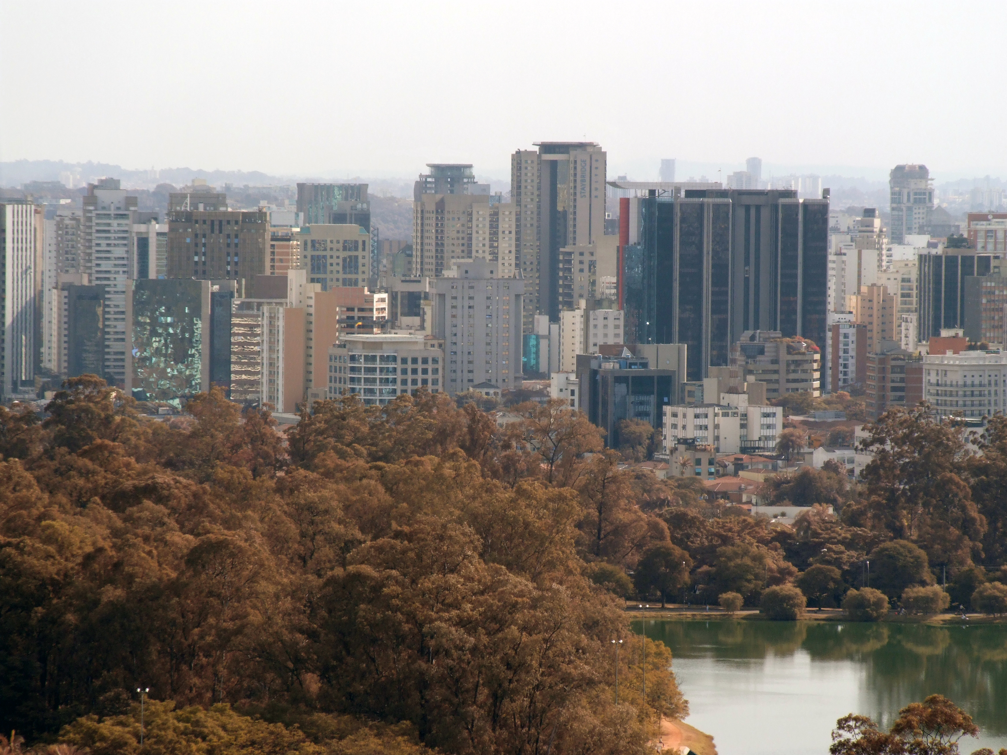 Parque do Ibirapuera com Vila Nova Conceição